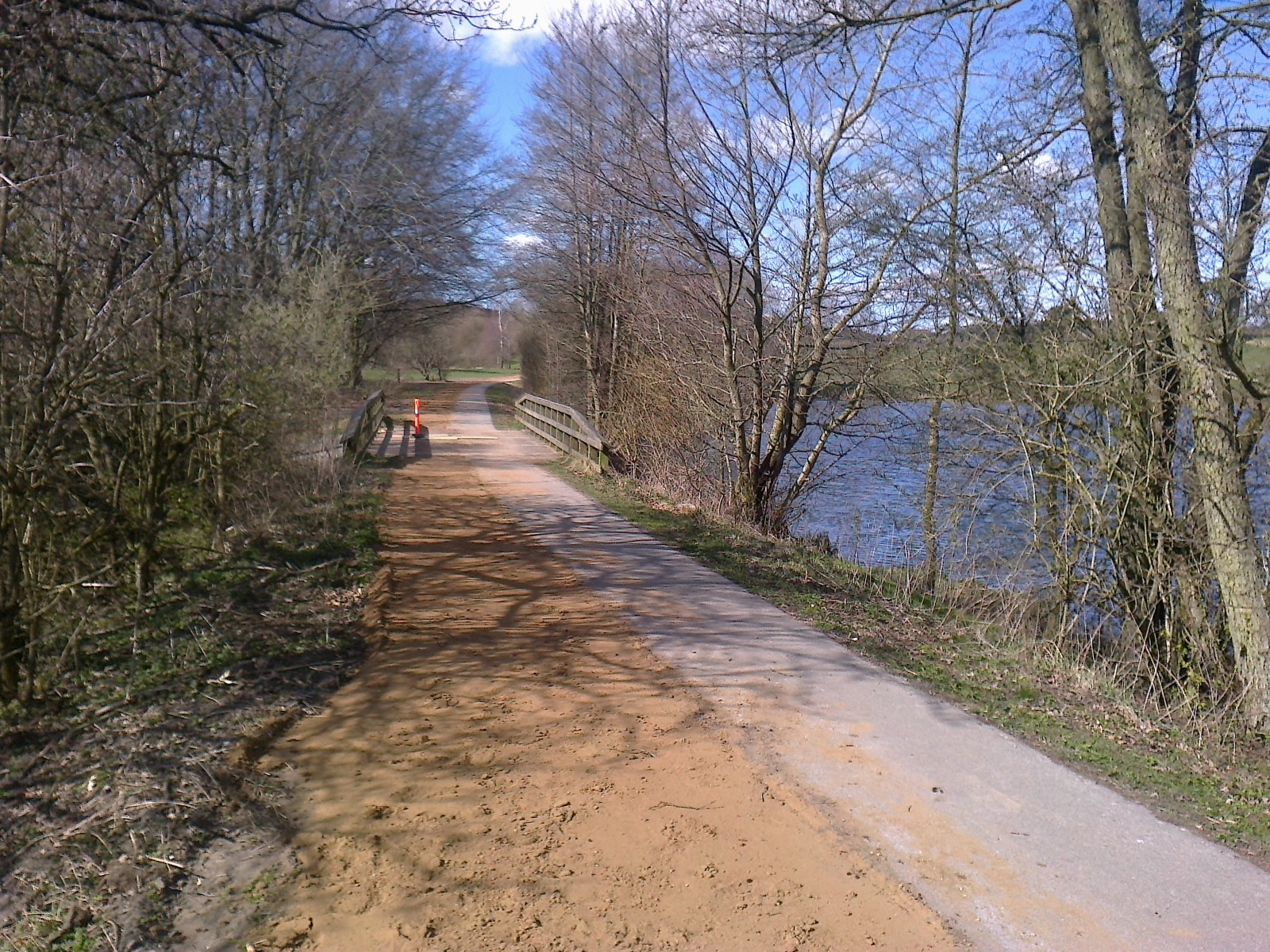 Bryrupbanestien passerer Vestbirk Sø og krydser broen over tilløbet fra Naldal Sø